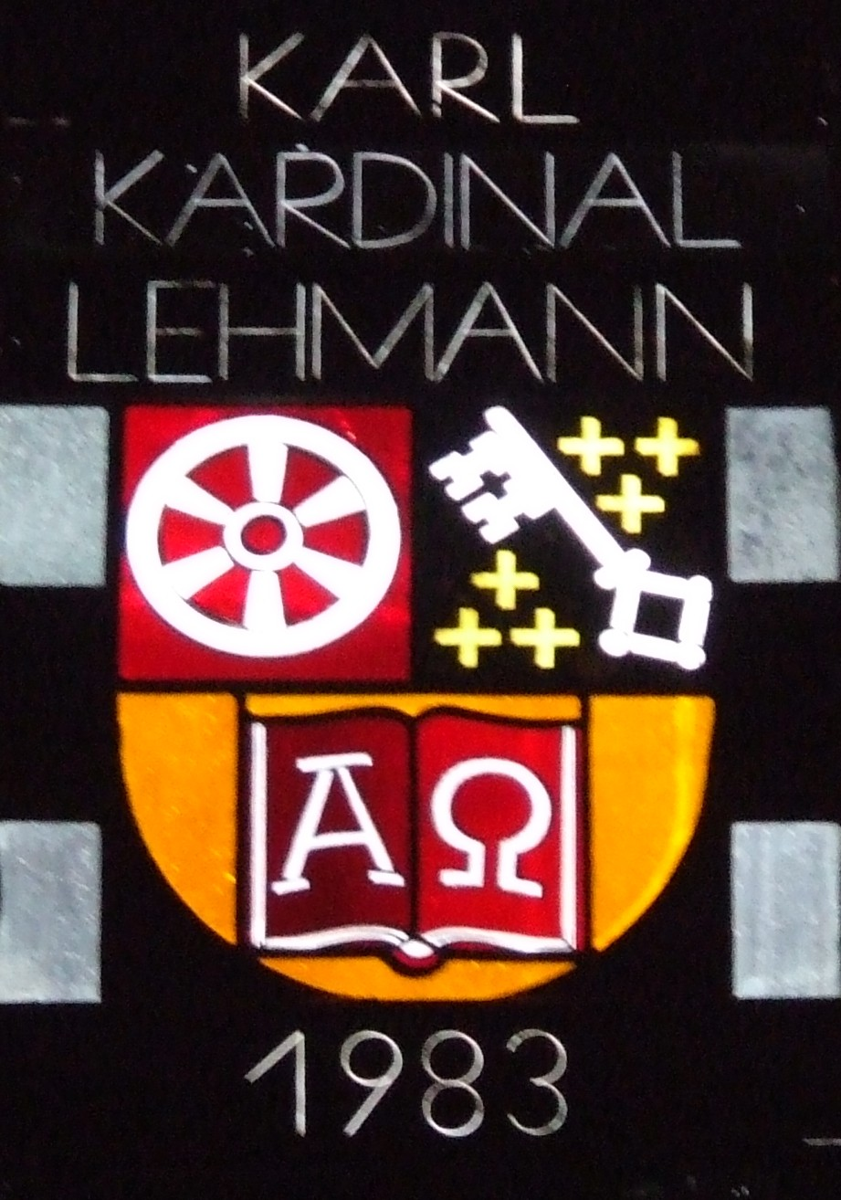 Mainzer Rad in den Wappen des Mainzer Bischofs. 3 Chor und 16 Schiffenster. Entwurf: Prof. Anton Wendling Ausführung: Hein Derix aus Kevelaer